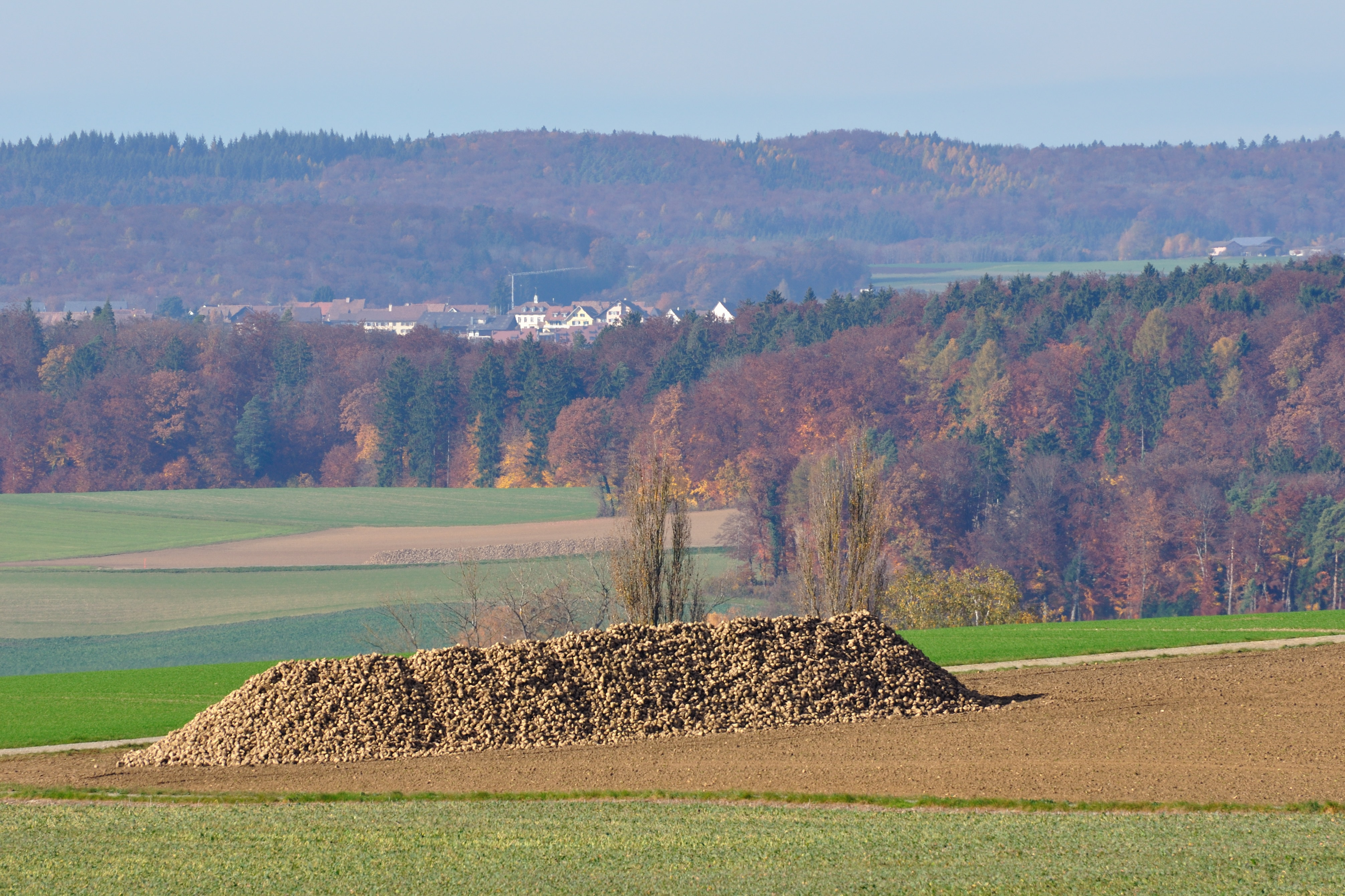 Switzerland, Canton of Schaffhausen, autumn walk in Dörflingen